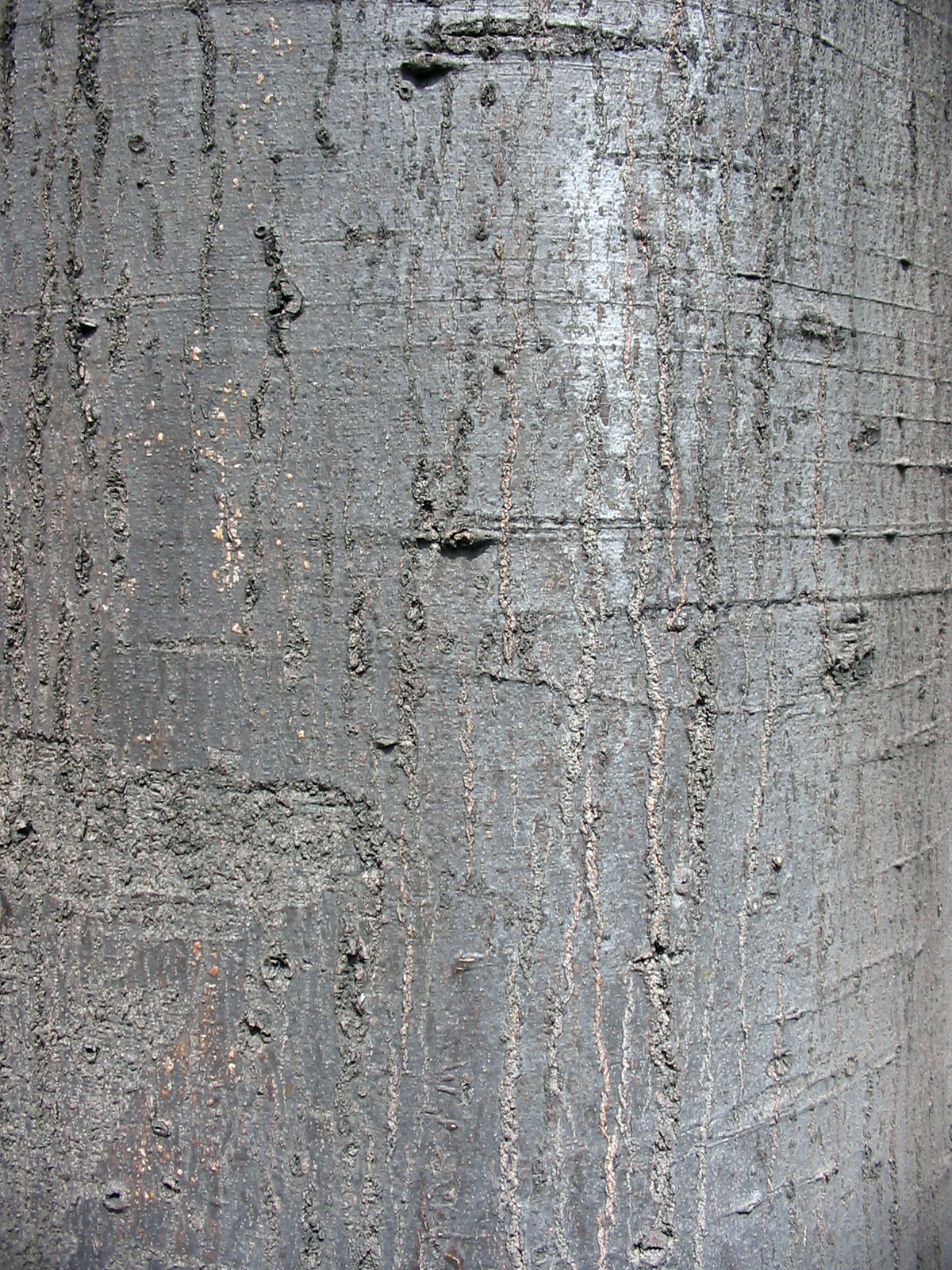 Textura del tronco del Celtis australis. La fotografía está realizada en el Real Jardín Botánico de Madrid. España.